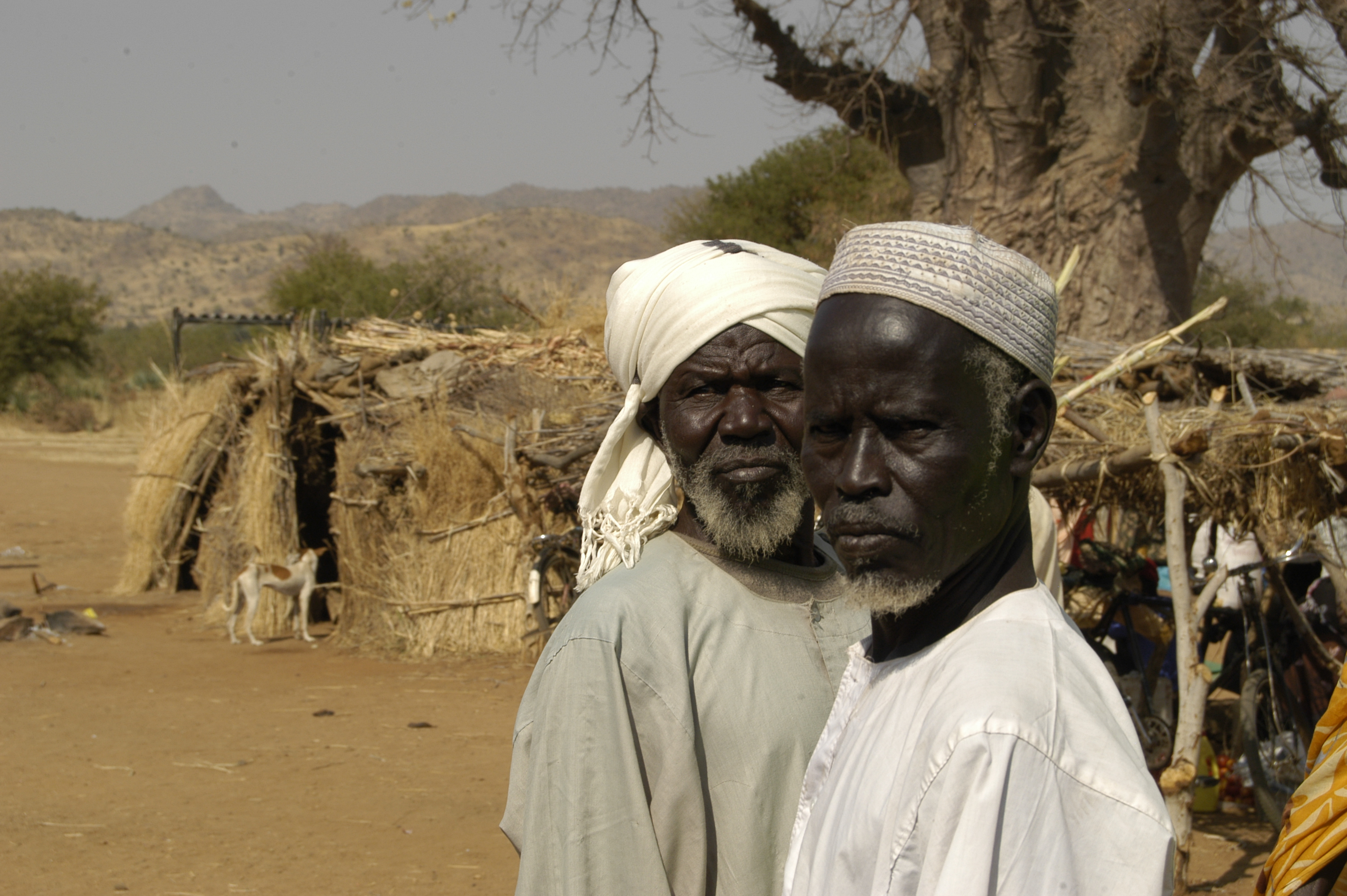 Nuba men at market in Kurchi, Nuba Mountains — southern Sudan.